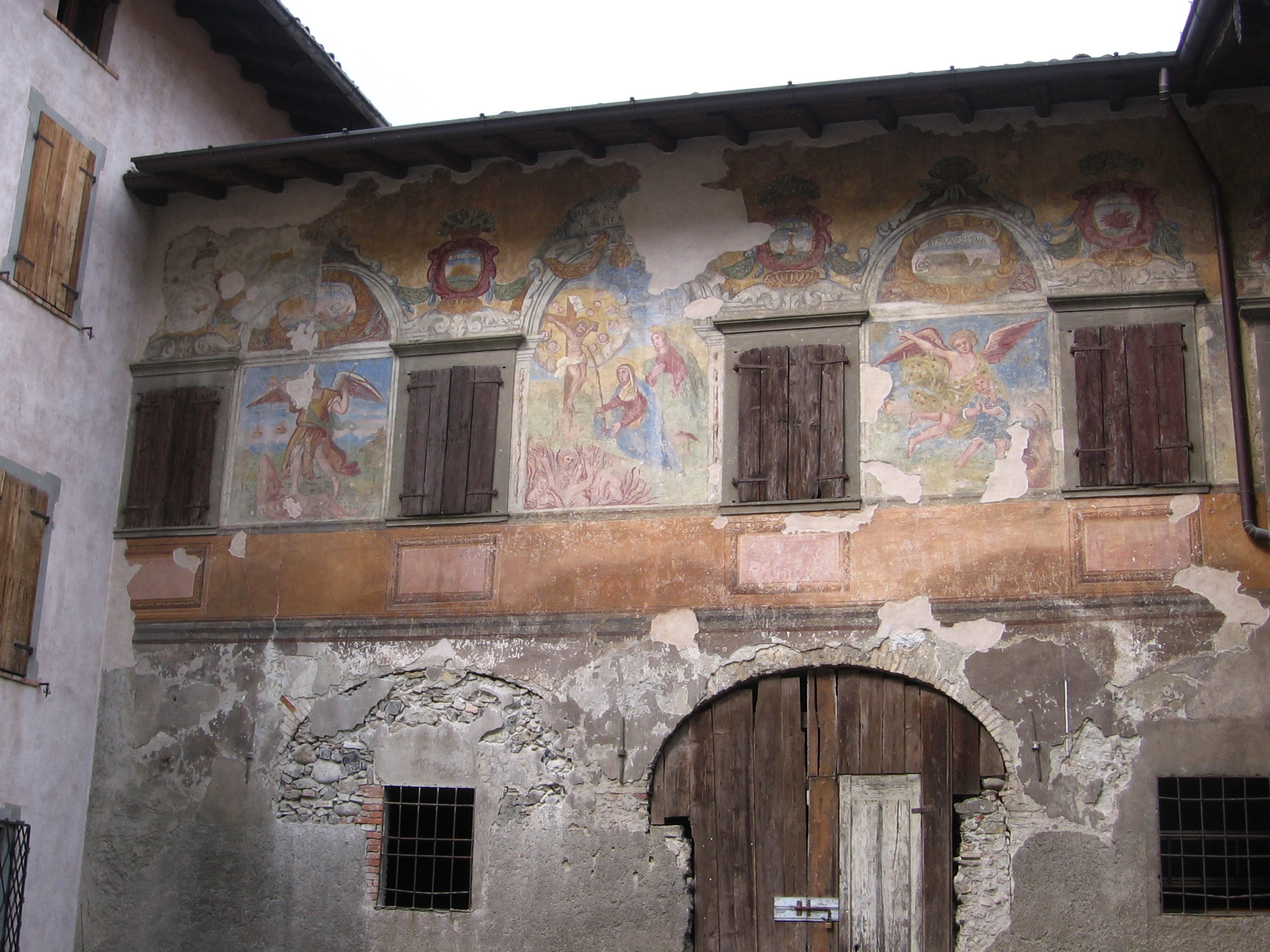 Casa del Suffragio (Sec. XIV), Casnigo (BG). Italia